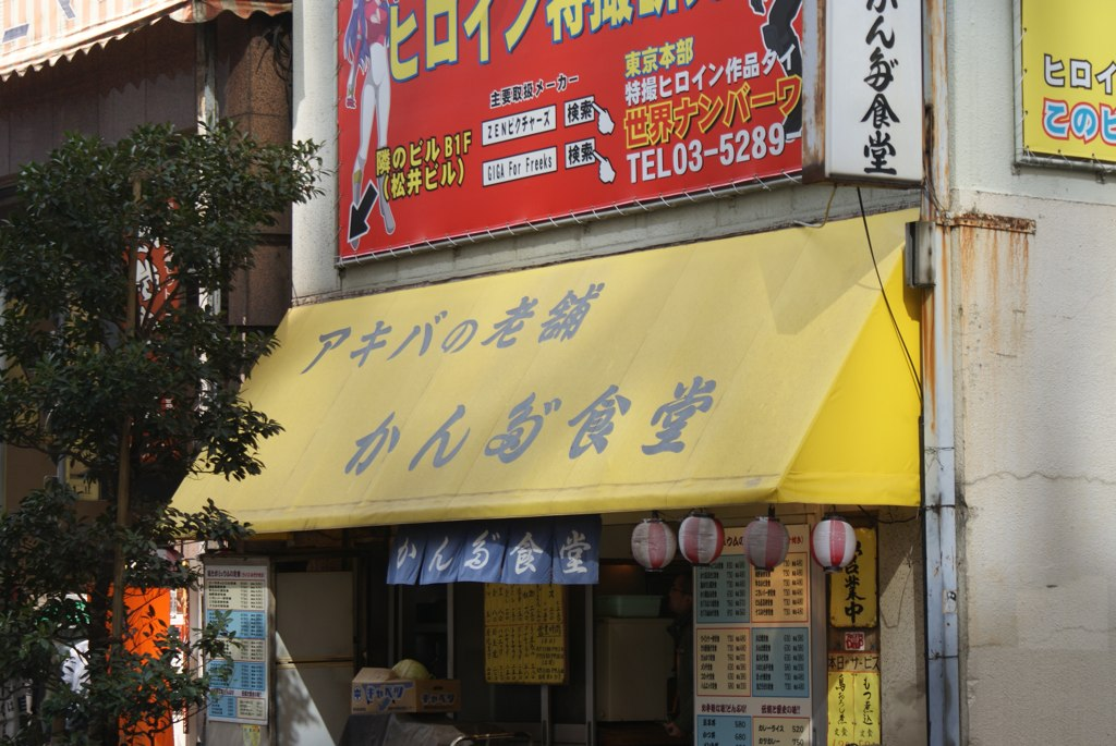 Kanda Shokudo, Akihabara